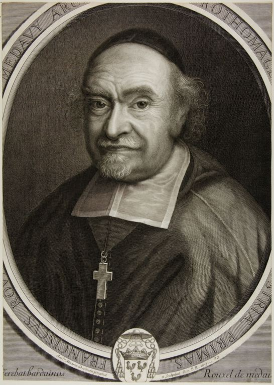 François Rouxel de Medavy (1604-1691), évêque de Séez (1651-1671) puis archevêque de Rouen (1671-1691). Gravure sur papier: 430 x 305 mm.